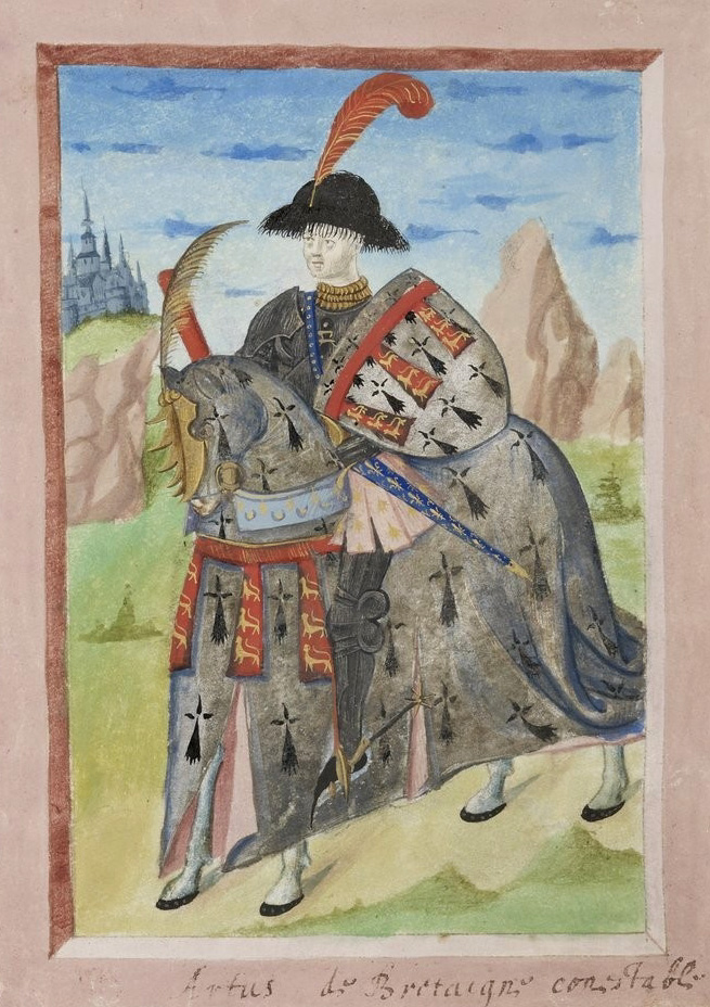 Arthur de Bretagne, comte de Richemont, connétable de France.